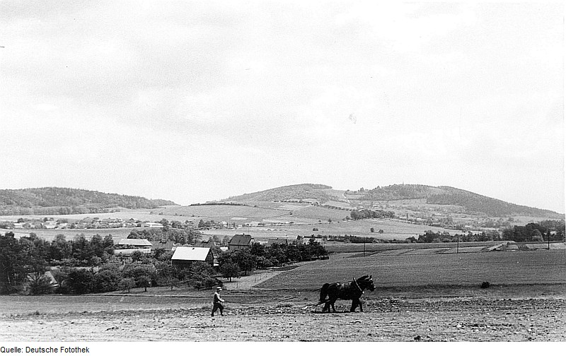 Original image description from the Deutsche Fotothek Doberschau-Gaußig-Diehmen. Blick vom Windmühlenberg auf den Picho